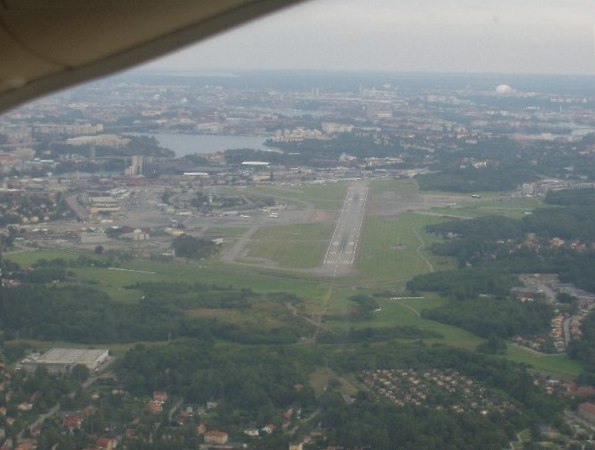 Bromma flygplats 2004 sedd från Nordväst